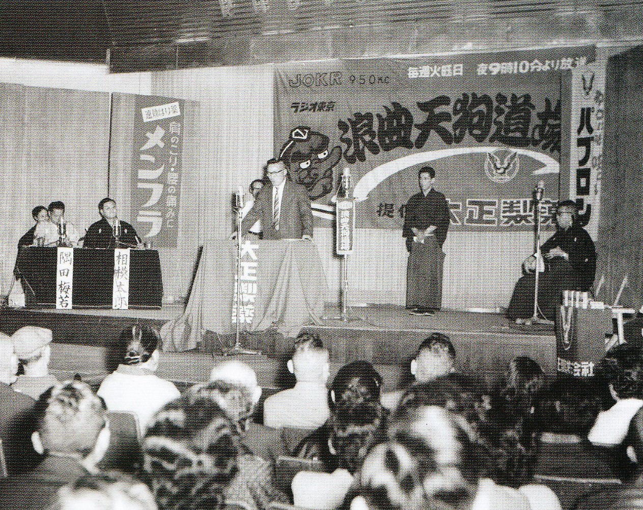 日本のラジオ番組『浪曲天狗道場』（1954年 - 1965年、ラジオ東京→東京放送=東京ラジオ→TBSラジオで放送）の公開収録風景（写真はラジオ東京時代=1960年までの間に撮影）。